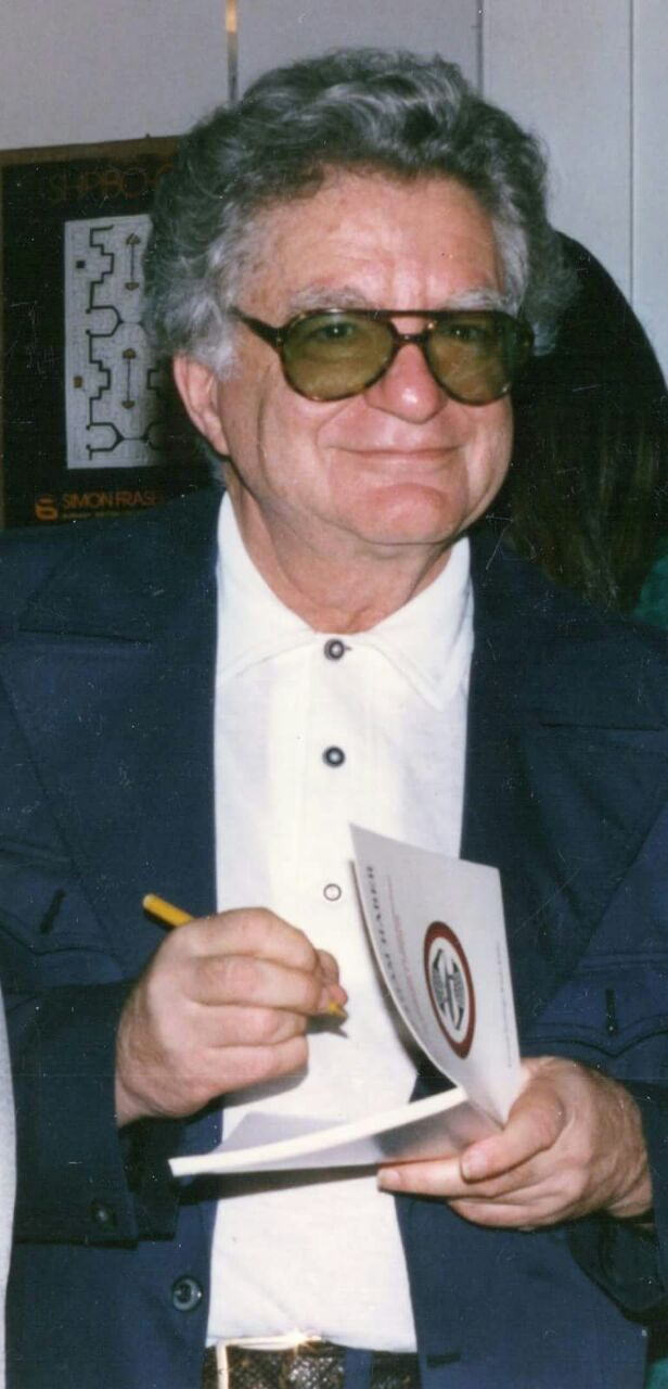 Abraham Haber firmando un libro de su autoría